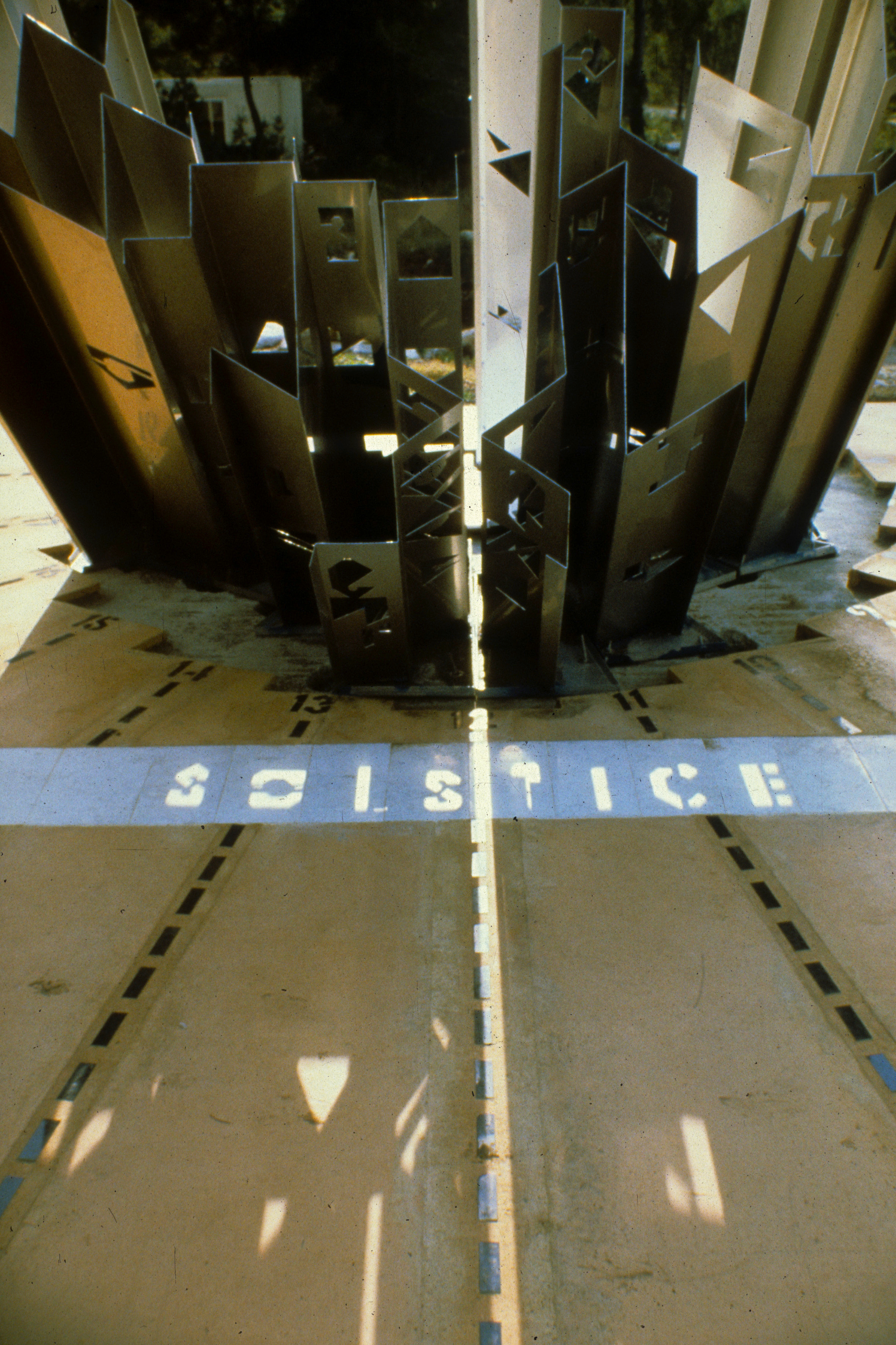 Cadran solaire commémoratif de Sophia Antipolis près de Nice, France (photo prise à midi solaire au solstice d'été)